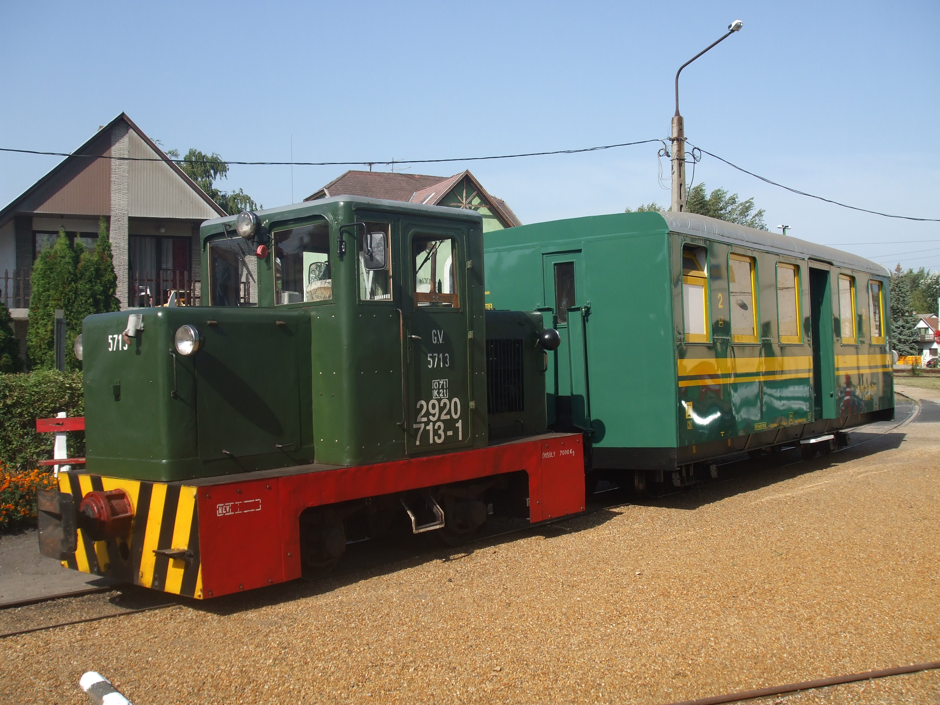 A GV 5713 pályaszámú C–50-es mozdony vonatával a Balatonfenyvesi Gazdasági Vasúton